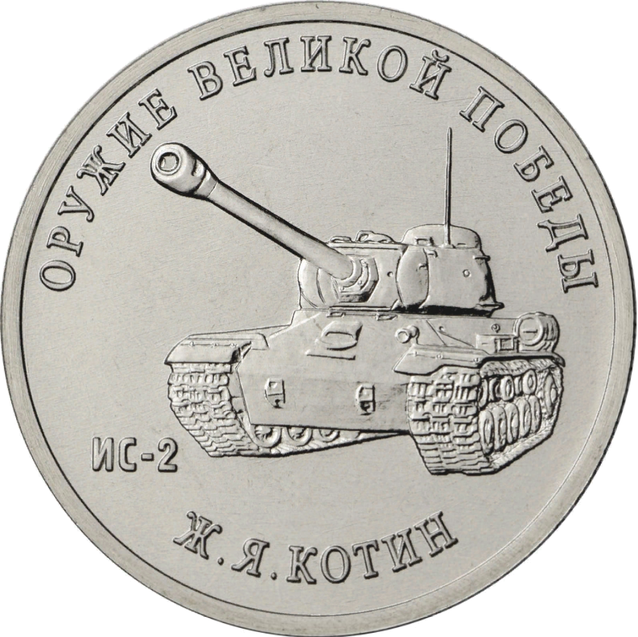 Монета Банка России. 25 рублей, реверс, анциркулейтед. Медно-никелевый сплав. Серия «Оружие Великой Победы (конструкторы оружия)». Конструктор оружия Ж.Я. Котин, танк ИС-2. Рельефное изображение тяжелого танка ИС-2, слева – надпись «ИС-2»; вдоль канта – надписи, вверху: «ОРУЖИЕ ВЕЛИКОЙ ПОБЕДЫ», внизу: «Ж.Я. КОТИН». Художник: А.В. Гнидин. Скульптор: О.Г. Шепель. Московский монетный двор.